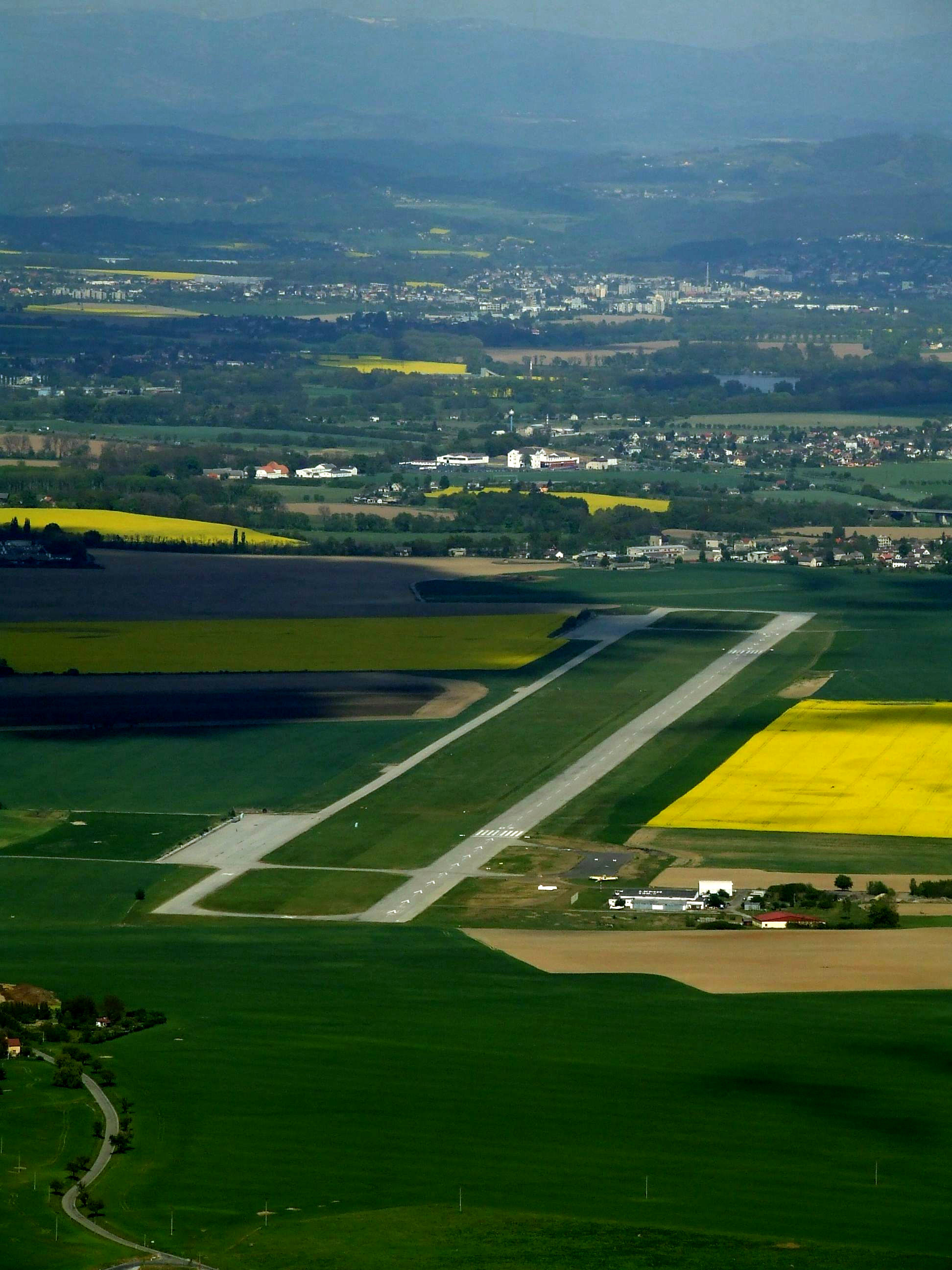 Letiště Mnichovo hradiště